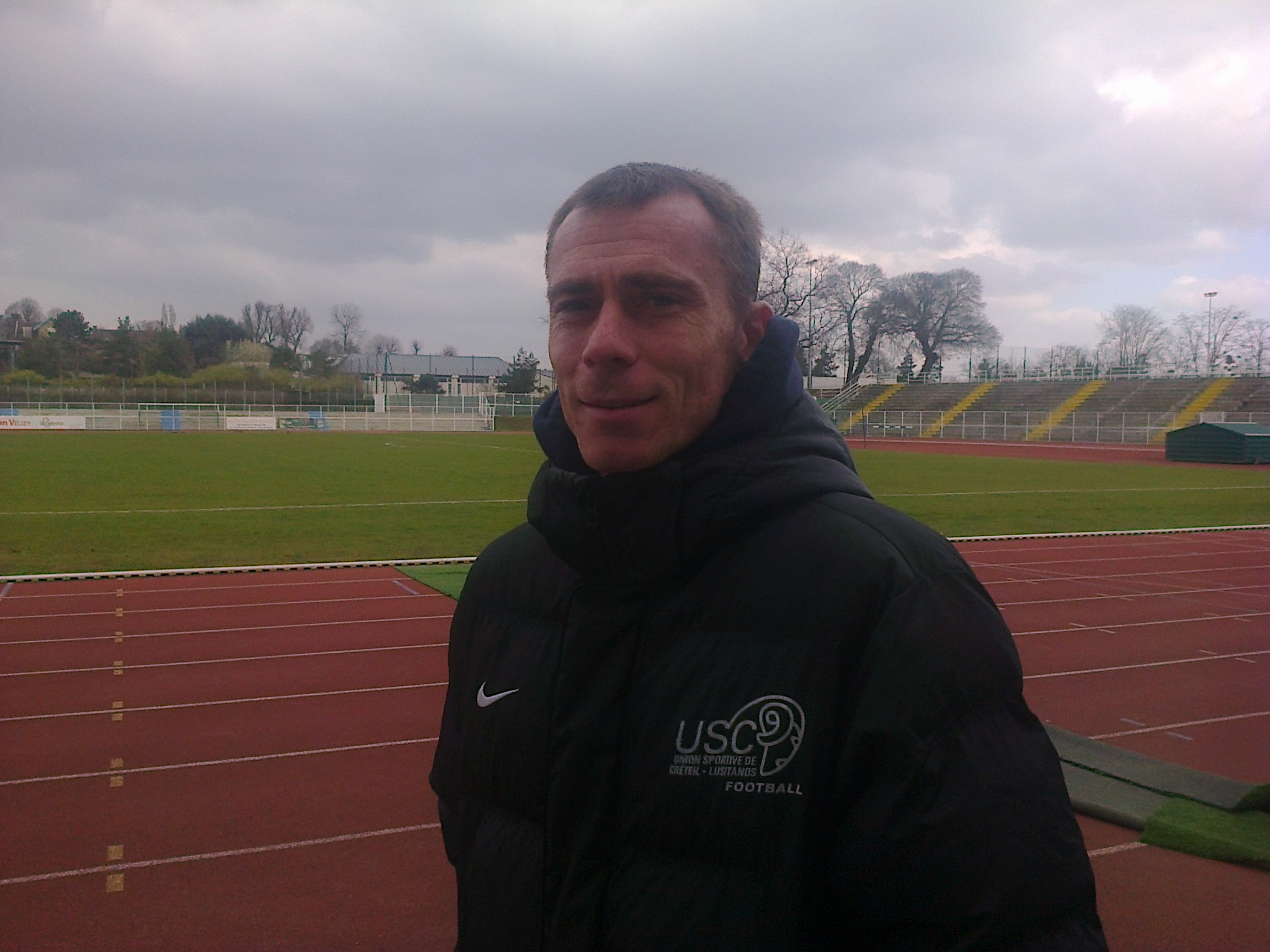 Sébastien Gondouin avant le match FC Versailles - US Créteil (DH, 1-1) le 22 mars 2015 au stade Montbauron